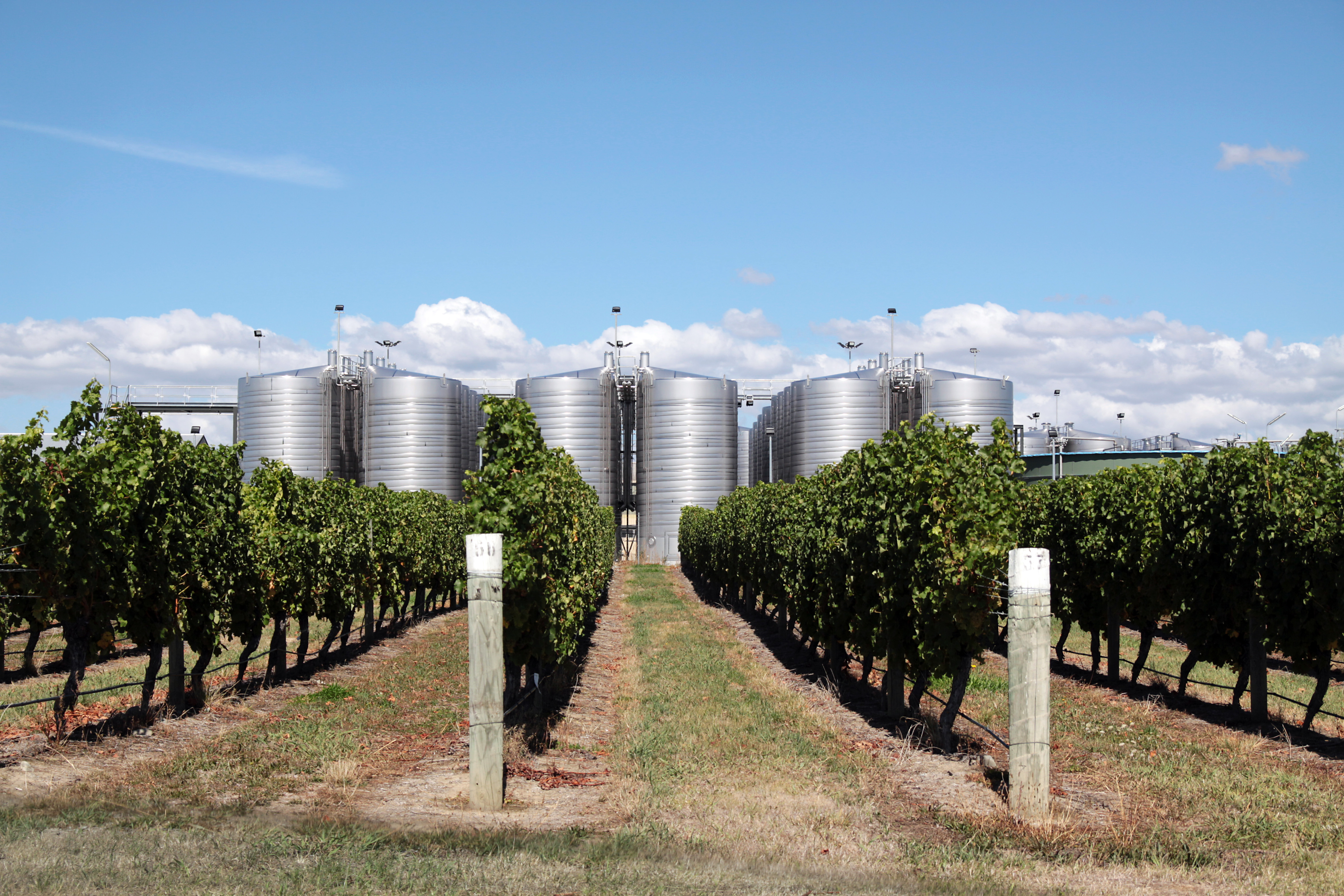 Vignoble à Marlborough et cuves inox extérieures